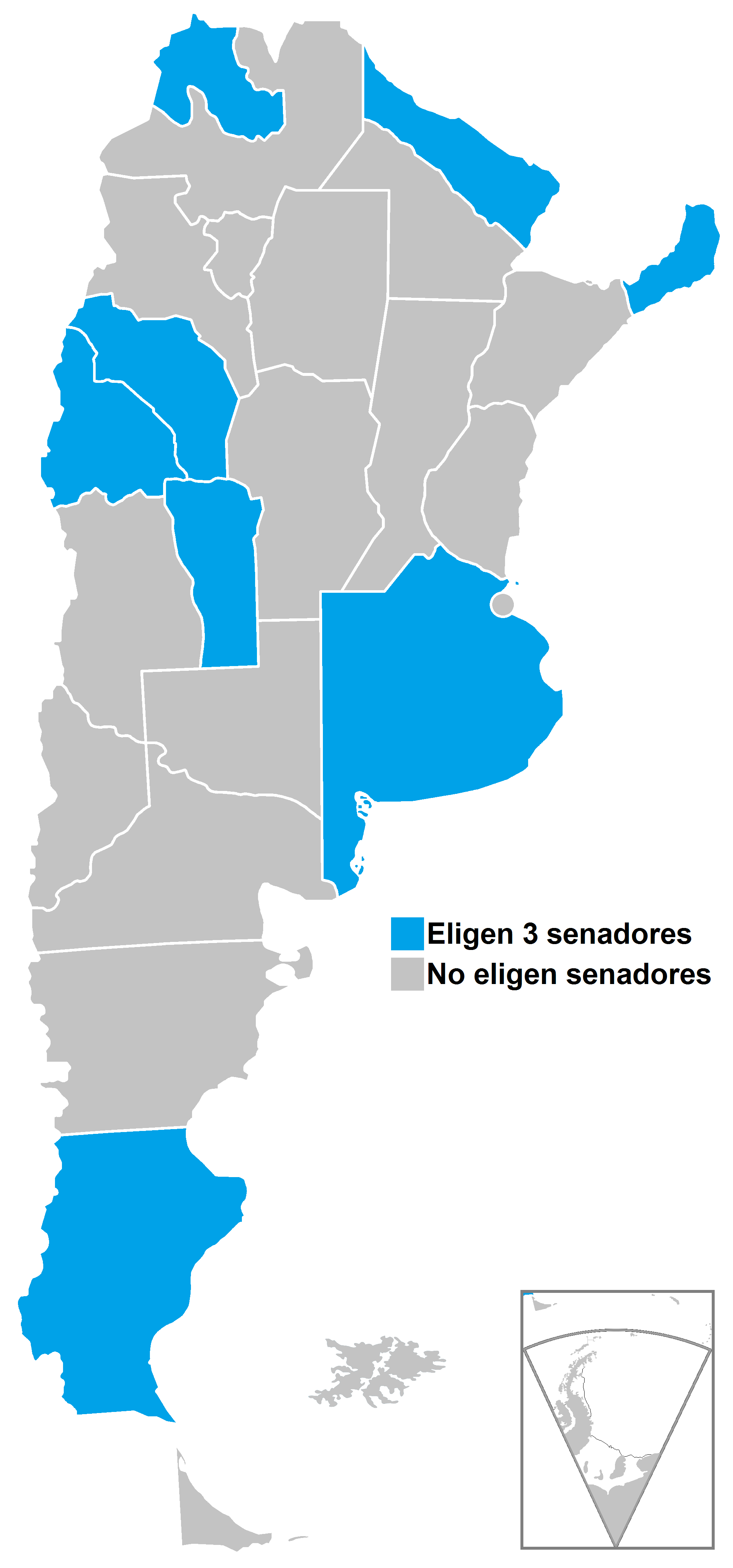 Elecciones legislativas de Argentina de 2017 - Senadores nacionales a renovar